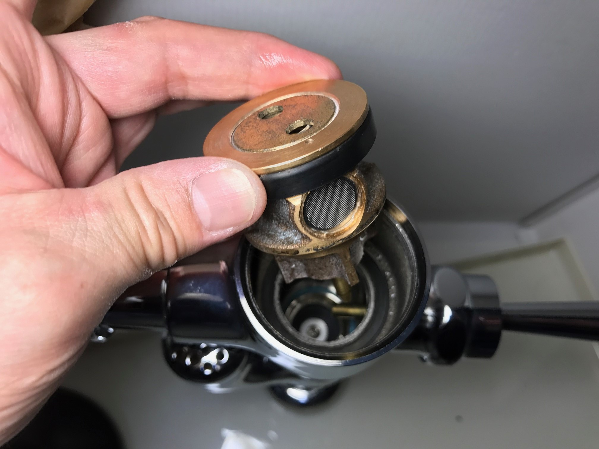 ピストンバルブ交換1